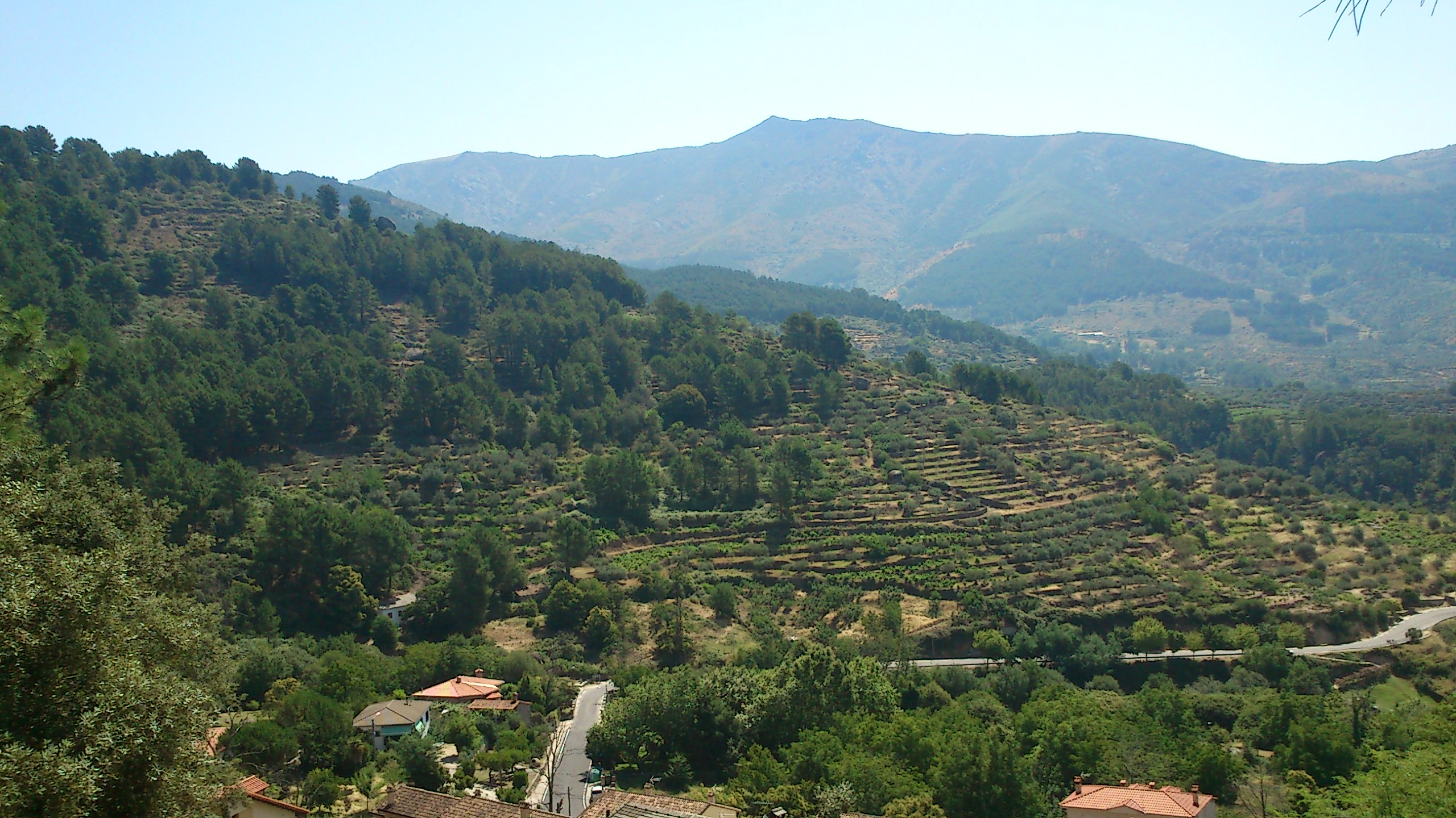 Bancales